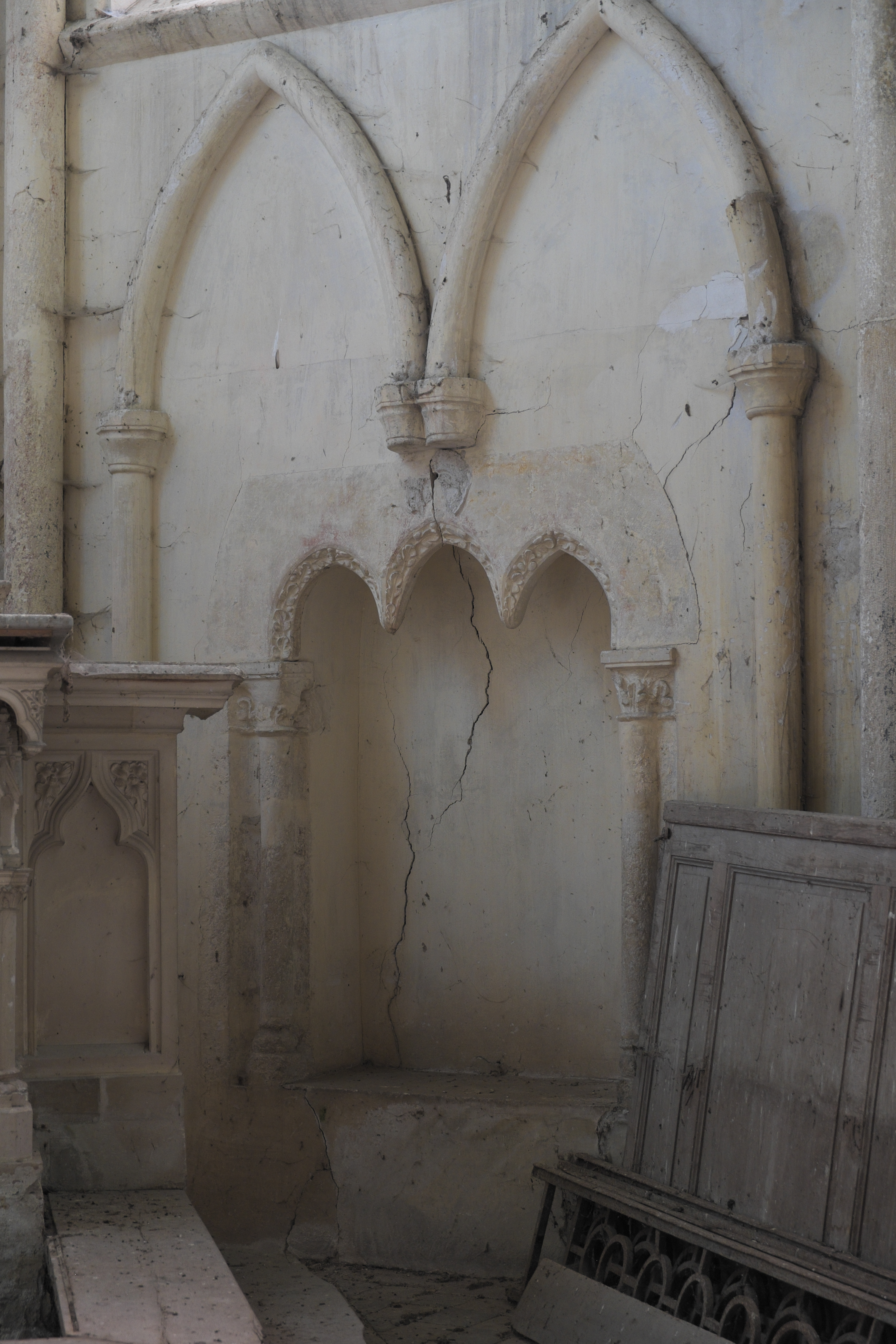 Kirche Saint-Pierre in Donnemarie-Dontilly im Département Seine-et-Marne (Île-de-France/Frankreich), Piscina